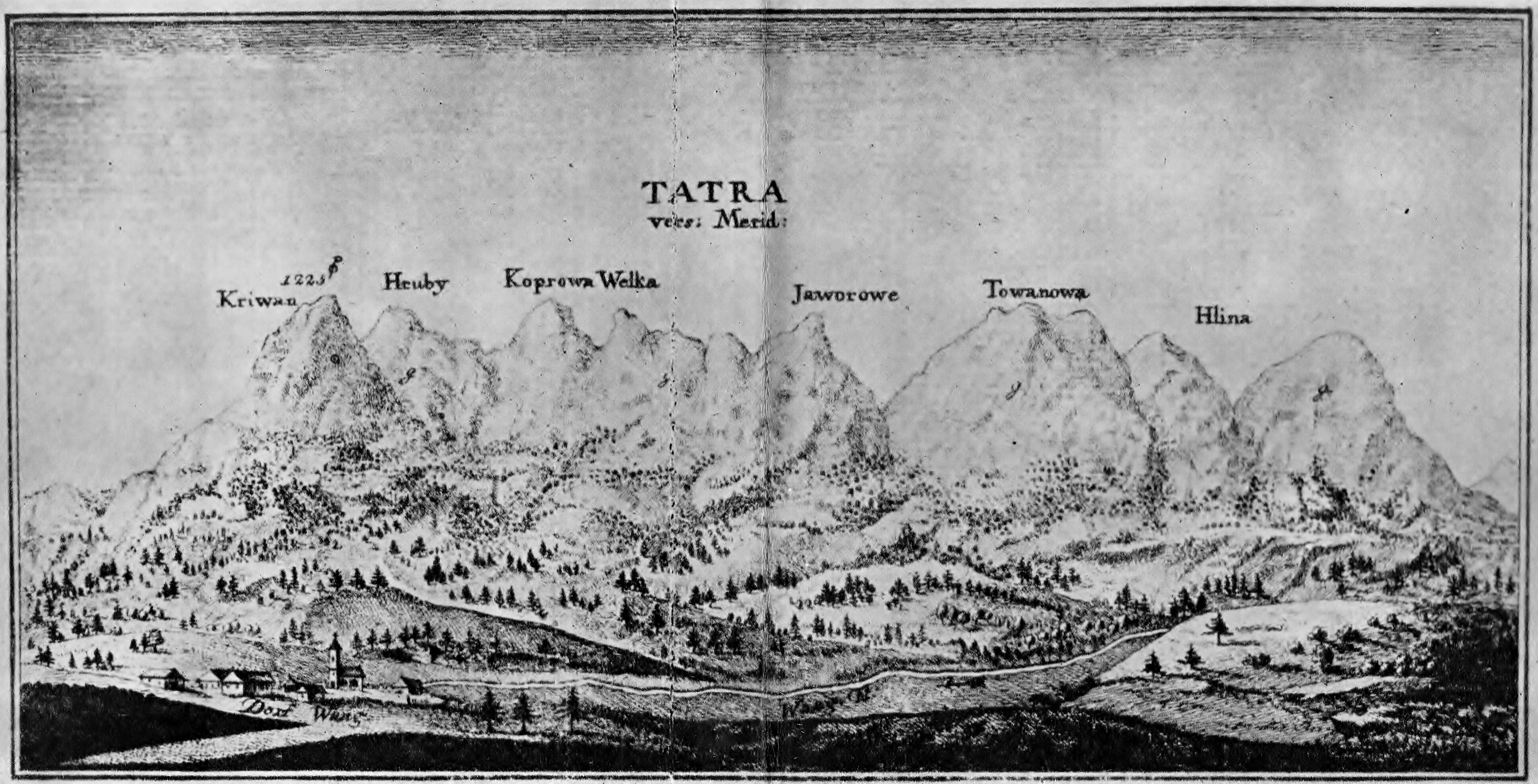 Mapa Vysokých Tatier od Važca z roku 1793